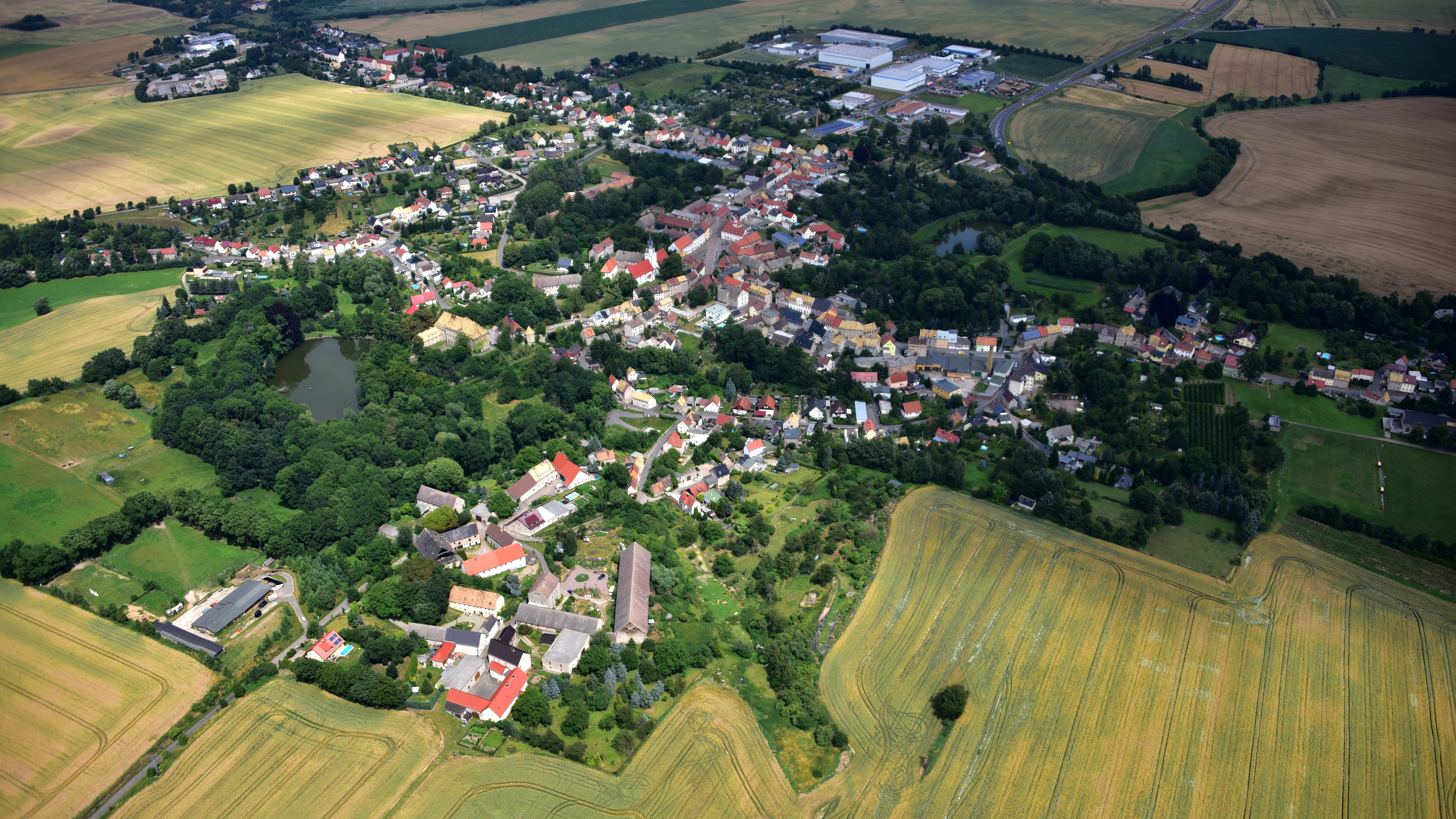 Mutzschen, Luftaufnahme (2017)